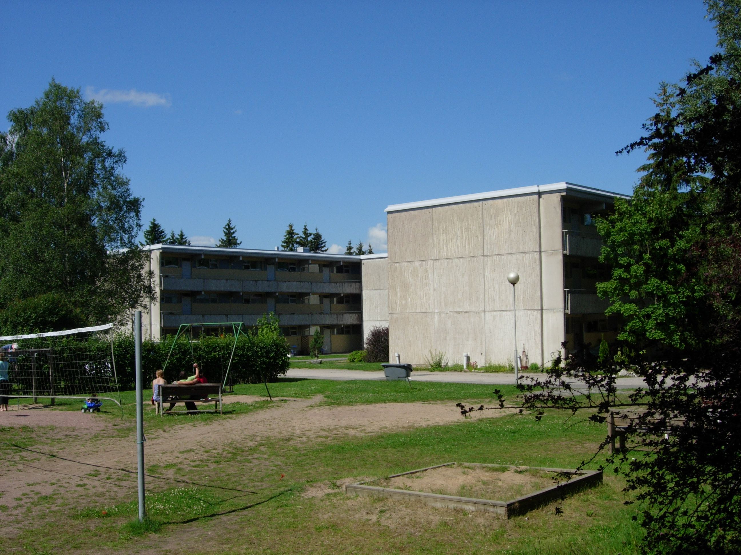 Savonkedonkatu 7, Kaerla, Turku. Kuvattu Kaerlantien puolelta.